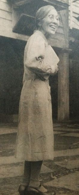 丹下ウメ